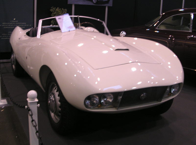 Arnolt Bristol deluxe, gesehen bei der Technoclassica in Essen 2005. Der 1958 in Stahlblech-Leichtbauweise auf einem Bristol 404-Chassis gebaute Roadster ist von Bertone entworfen. 6 Zylinder, 3 Vergaser, 1971 cm³ Hubraum, 4 Gänge. Von den 142 gebauten Fahrzeugen sollen noch ~ 60 existieren, dieses wurde für 115.000 € angeboten